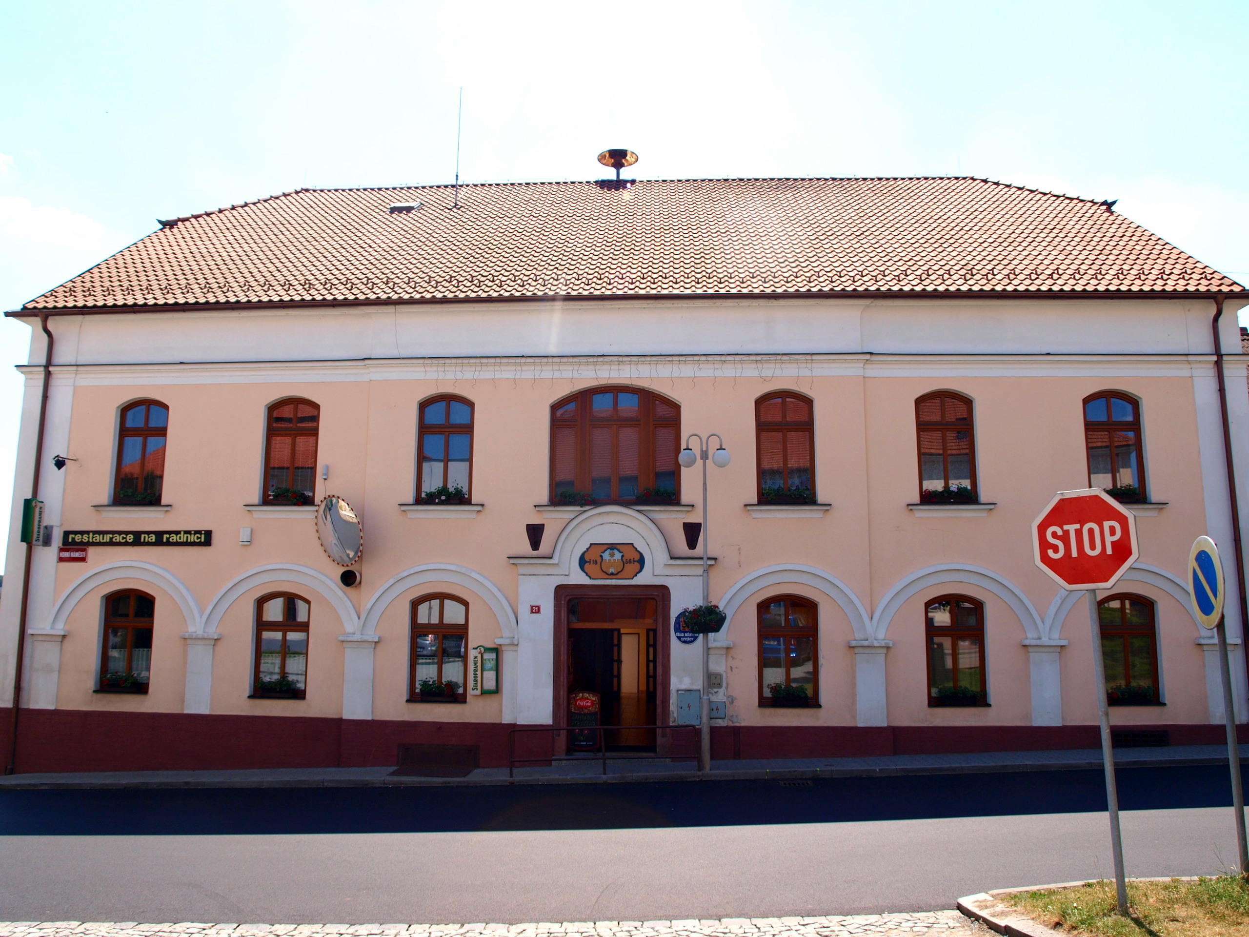 Divišov